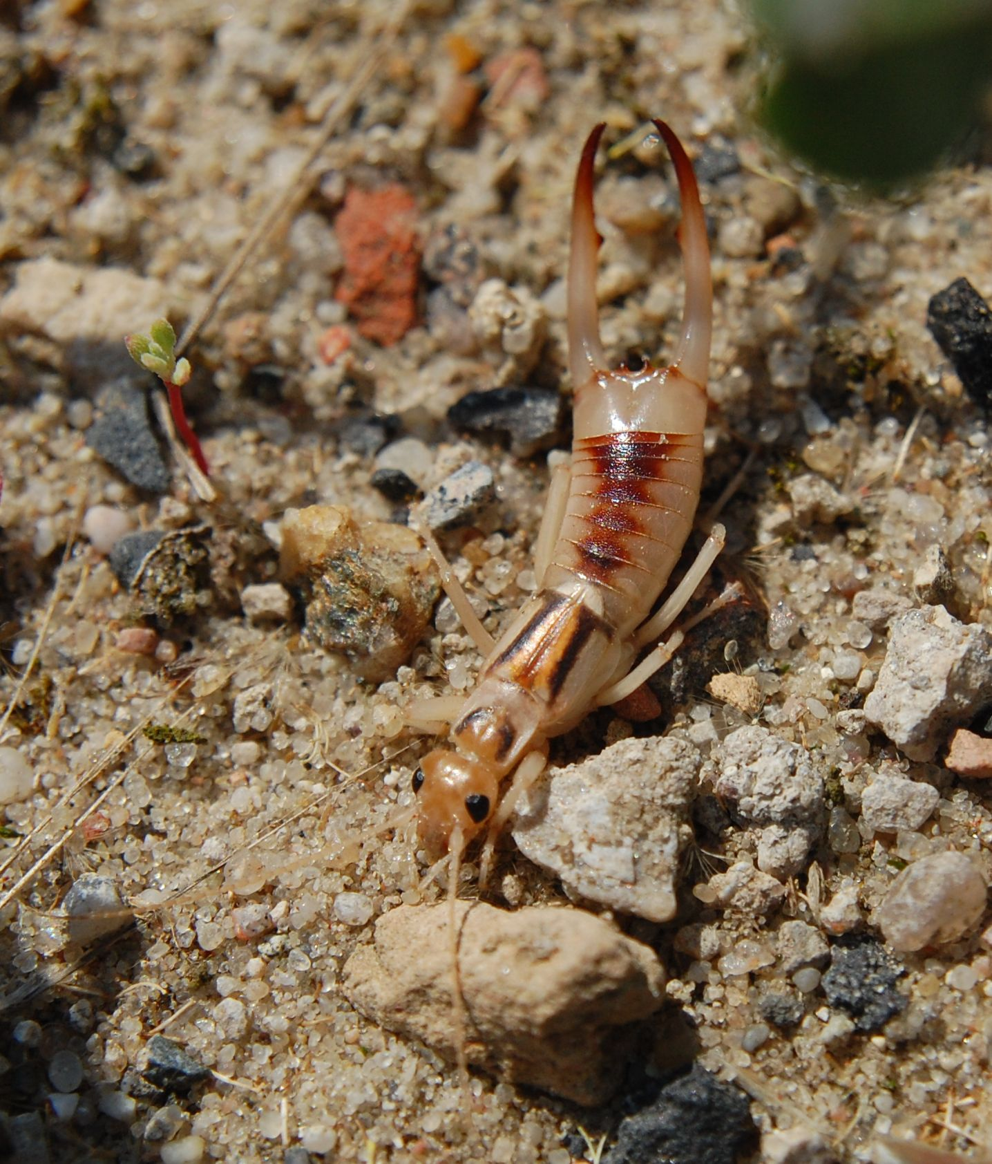 Labidura riparia, male